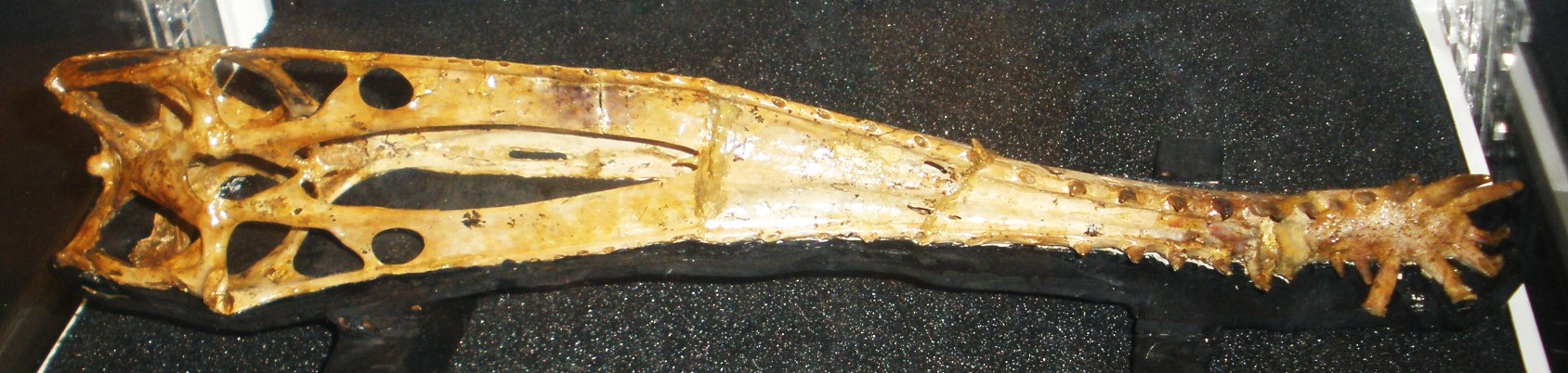 Fossil of Anhanguera, an extinct reptile-- Took the photo at Natural History Museum, London